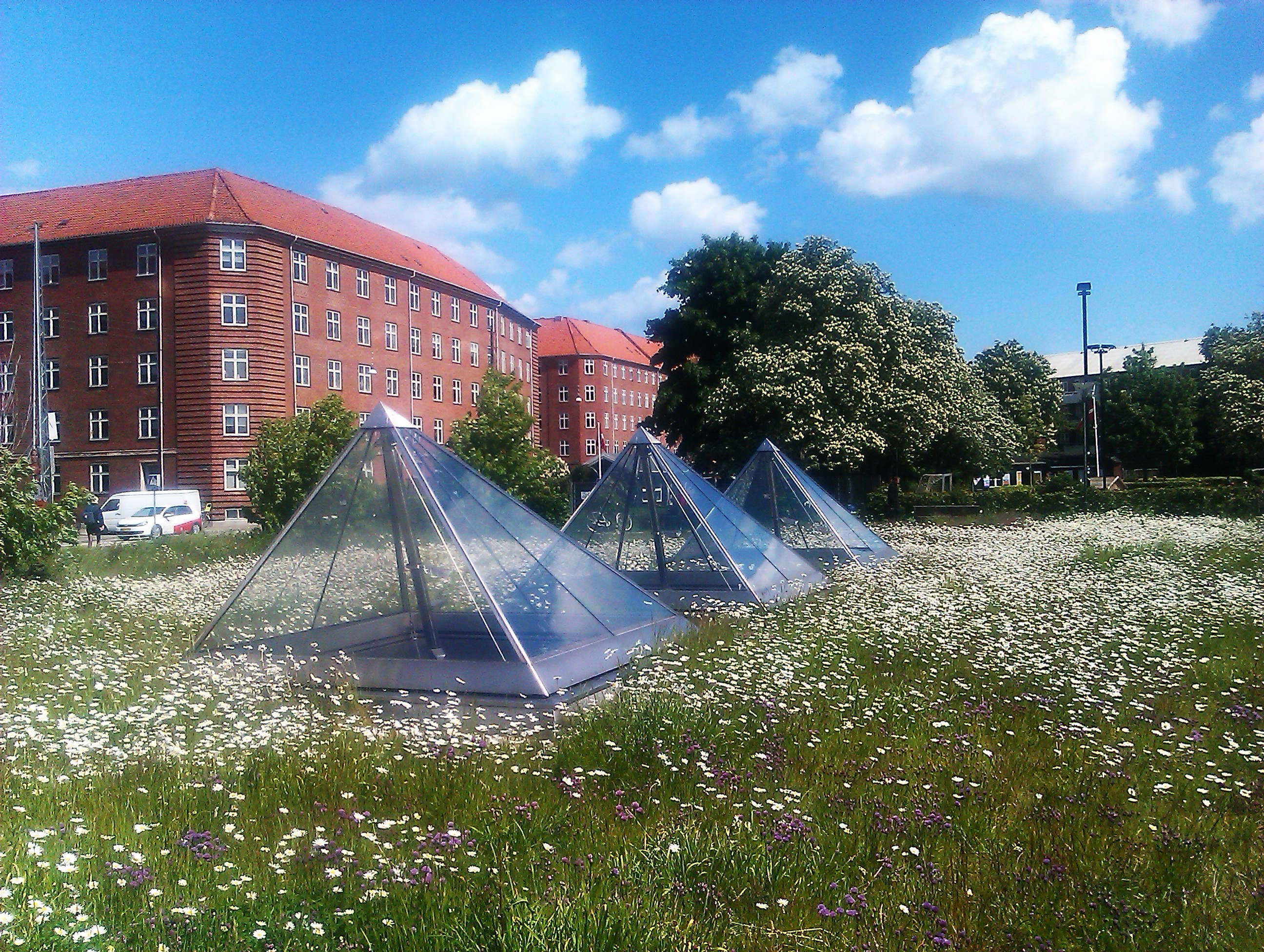 Blomstereng ved Metrostation Lergravsparken. I baggrunden til venstre skimtes Lergravsvej. Amager ved København